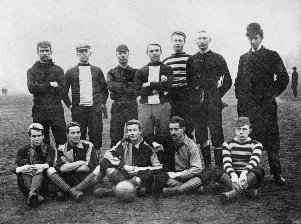 Nederlands Elftal - Felixstow: 0-1 (6-2-1894) gespeeld op het Sparta-terrein te Rotterdam. Doelverdediger: S.W. Tromp (HFC), rechtsachter: N.J. Kampers (RAP), linksachter: K. Ples (HFC), rechtsmidden: J.W.F v.d. Bosch (HVV), spil: H. Menten (HFC), linksmidden: J.C. Schröder (RAP), rechtsbuiten: F. Ph. Kampschuur (Sparta), rechtsbinnen: J.B. Kan (Victoria R'dam), middenvoor: J.A.M. Timmermans (Sparta), linksbinnen: L. Weinthal (Sparta), linksbuiten: J.H. Meyer (HFC), aanvoerder: J.C. Schröder